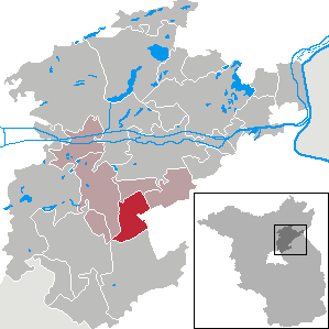 Sydower Fließ in Brandenburg (Country) - District Barnim